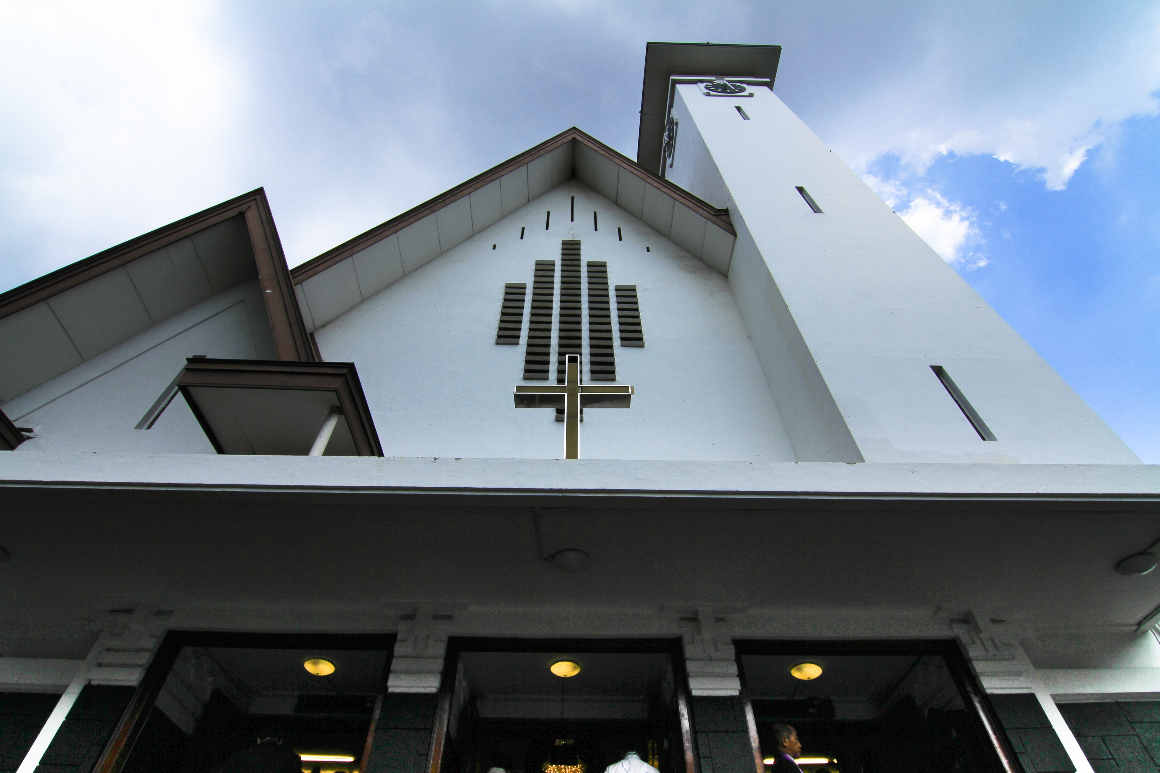 Tampak Depan